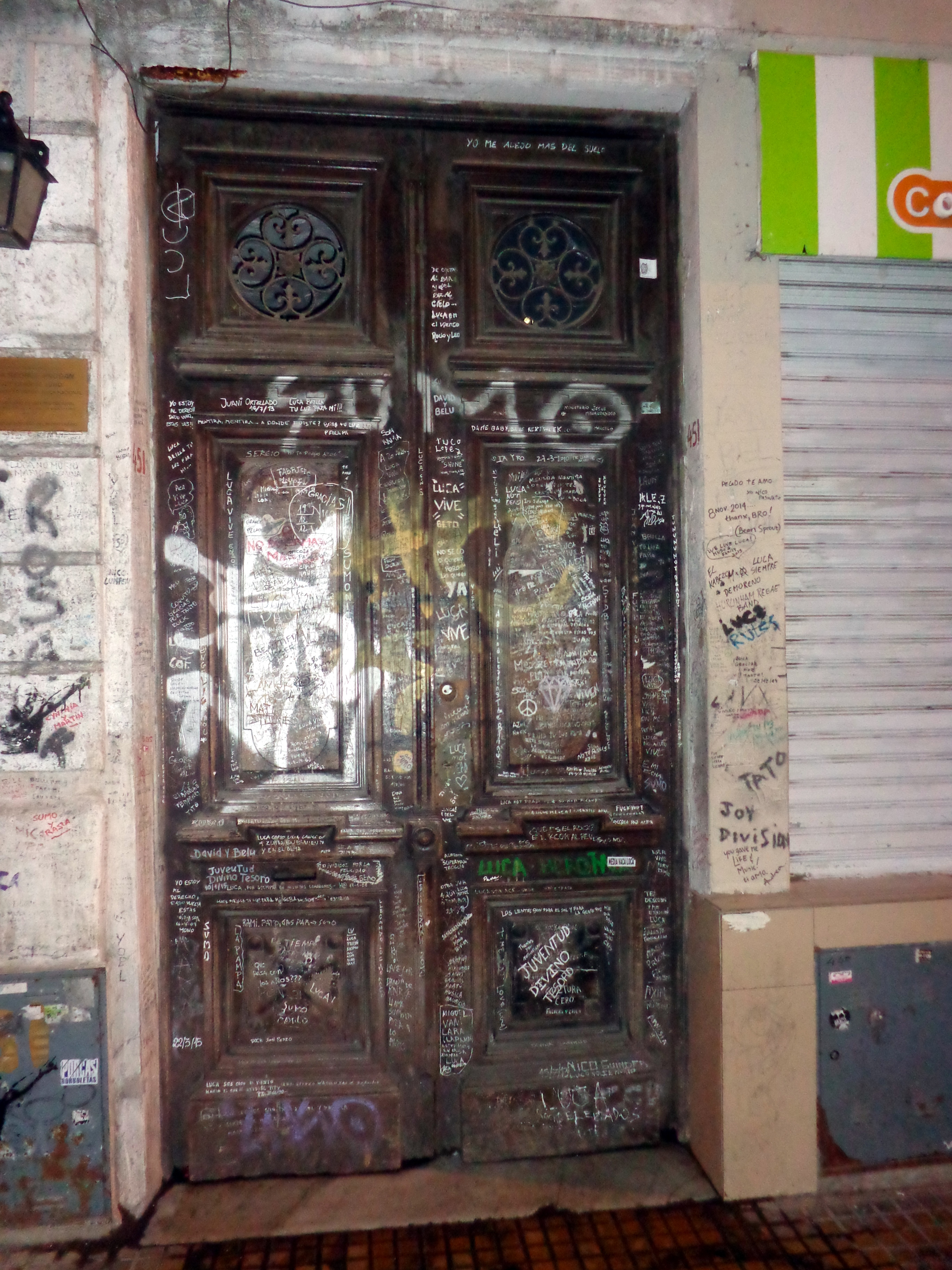 Última casa de Luca Prodan, en Alsina 451, actualmente Espacio Cultural donde funciona un bar, se realizan ciclos de cine y se presentan bandas. Museo informal de un mito del rock.